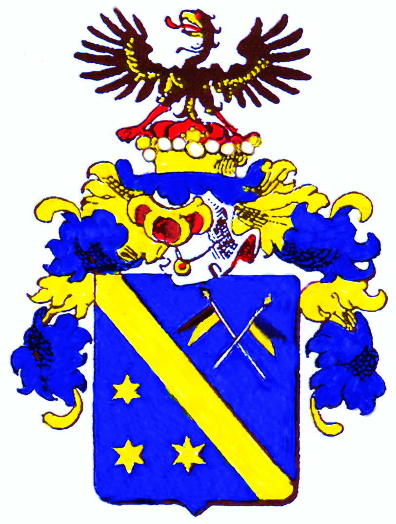 Wappen der Freiherrn von Sokcsevits von 1860, ungarische Variation